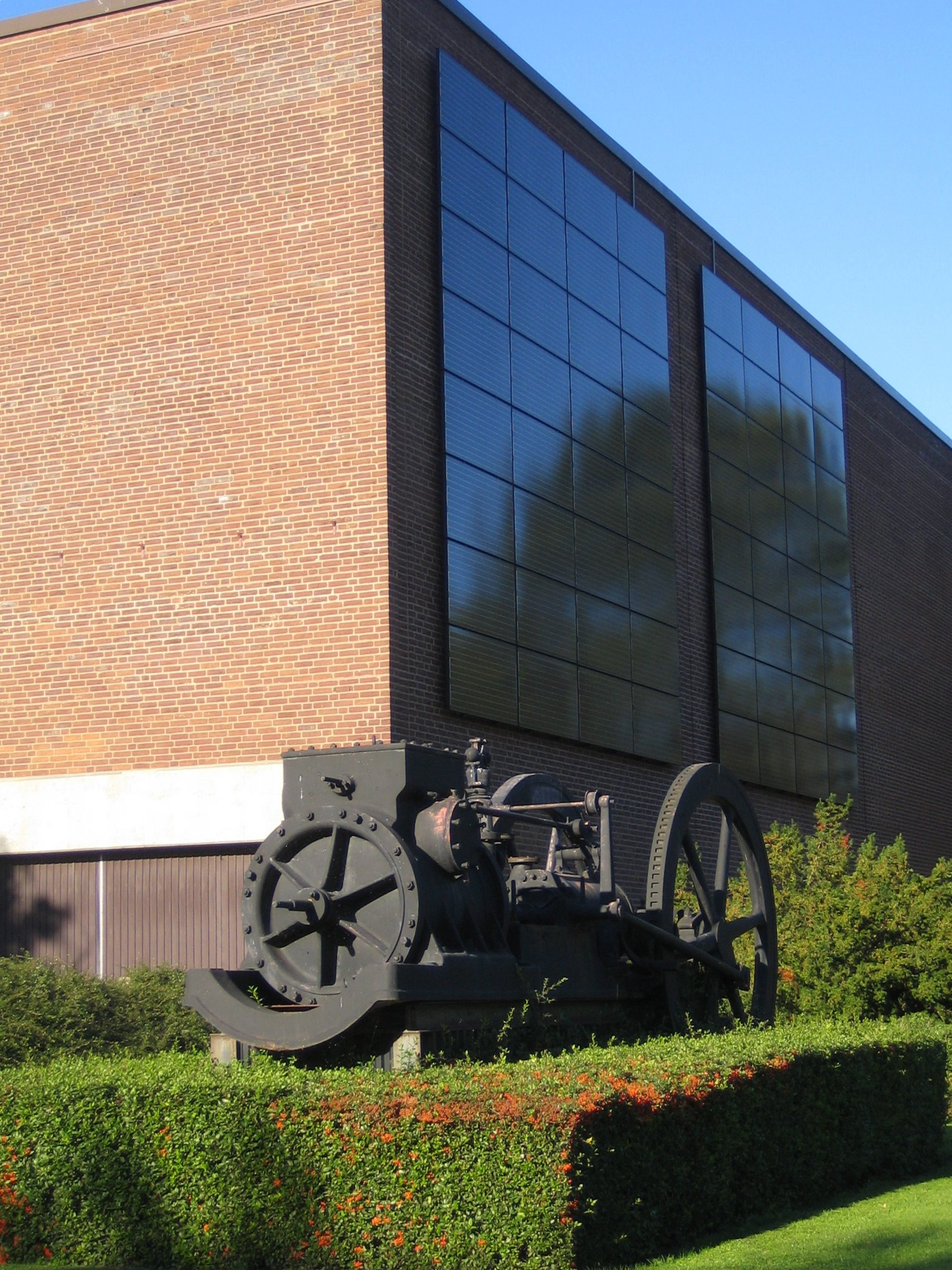 Teknikens och sjöfartens hus, Malmö, Sweden